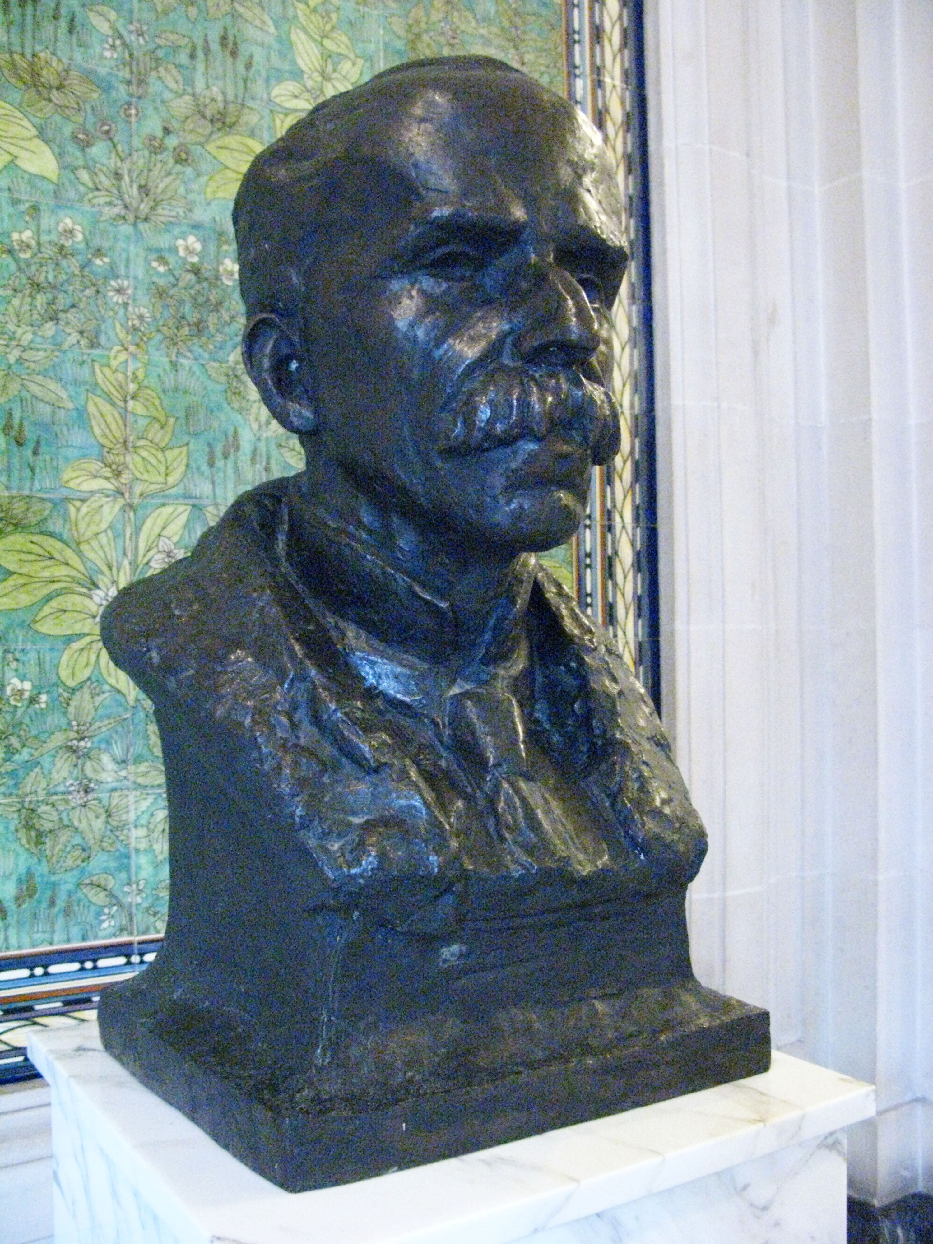 Buste de Rui Barbosa a se trouvant dans le Palais de la Paix Peace Palace Den Haag The Hague La Haye